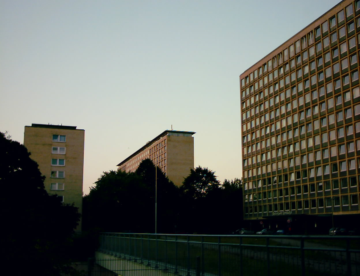 Bildbeschreibung: Grindelhochhäuser, Hamburg-Harvestehude Datum: 21.9.2005